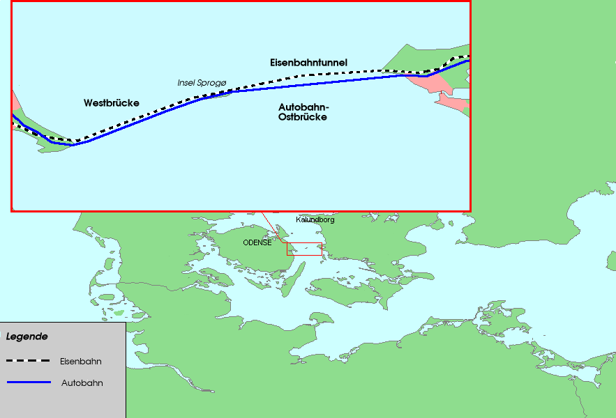 Detailkarte vom Großen Belt m. Brücke Zeichner: Benutzer:Ratatosk ★